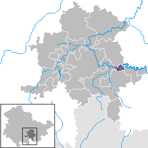 Hohenwarte in Thuringia - District Saalfeld-Rudolstadt